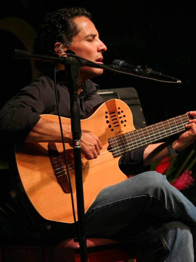 Alejandro Filio. Ruta Maya. Octubre de 2007.